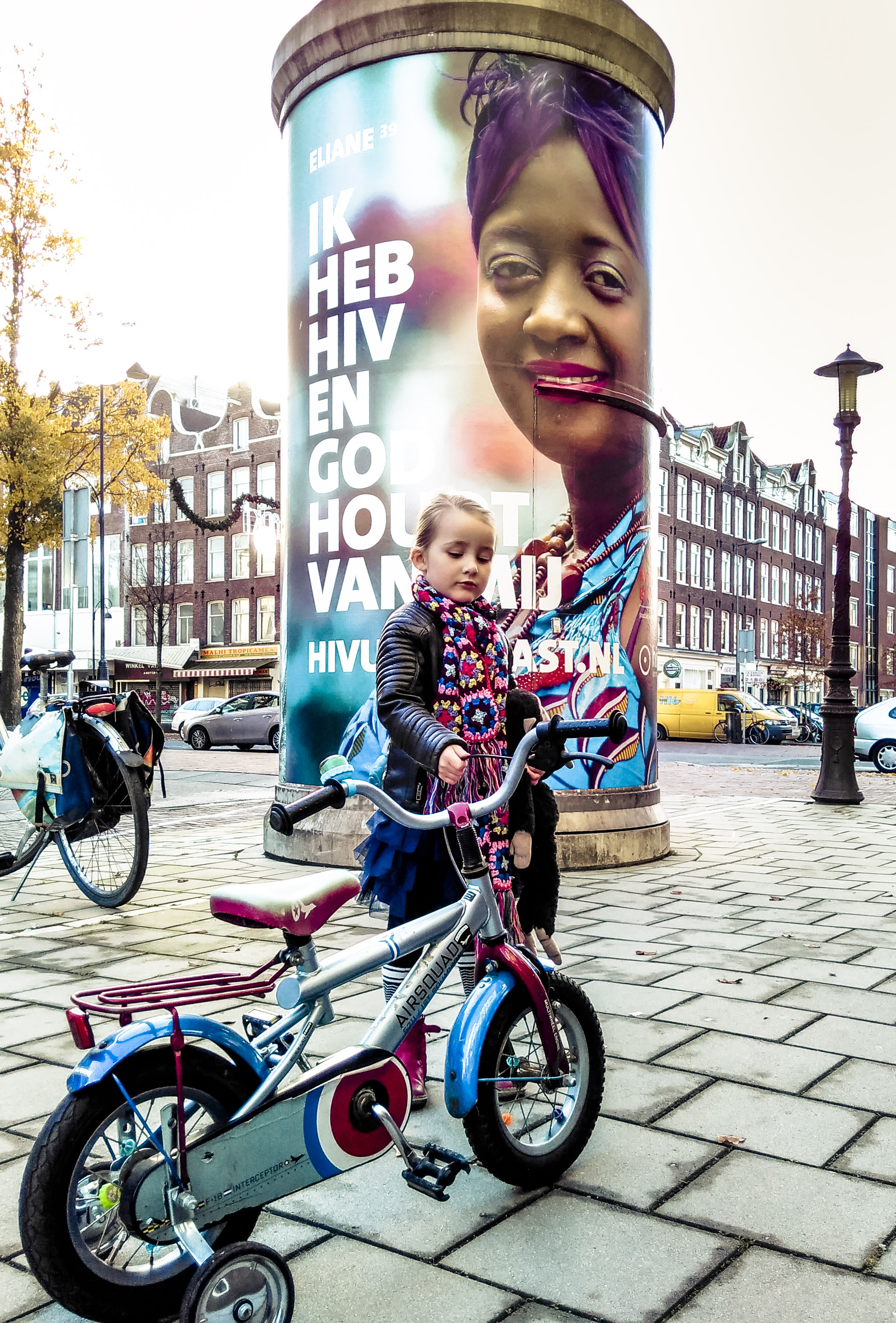 Peperbus met poster ter gelegenheid van Wereldsaidsdag 2016 met afbeelding van Eliane Becks Nininahazwe